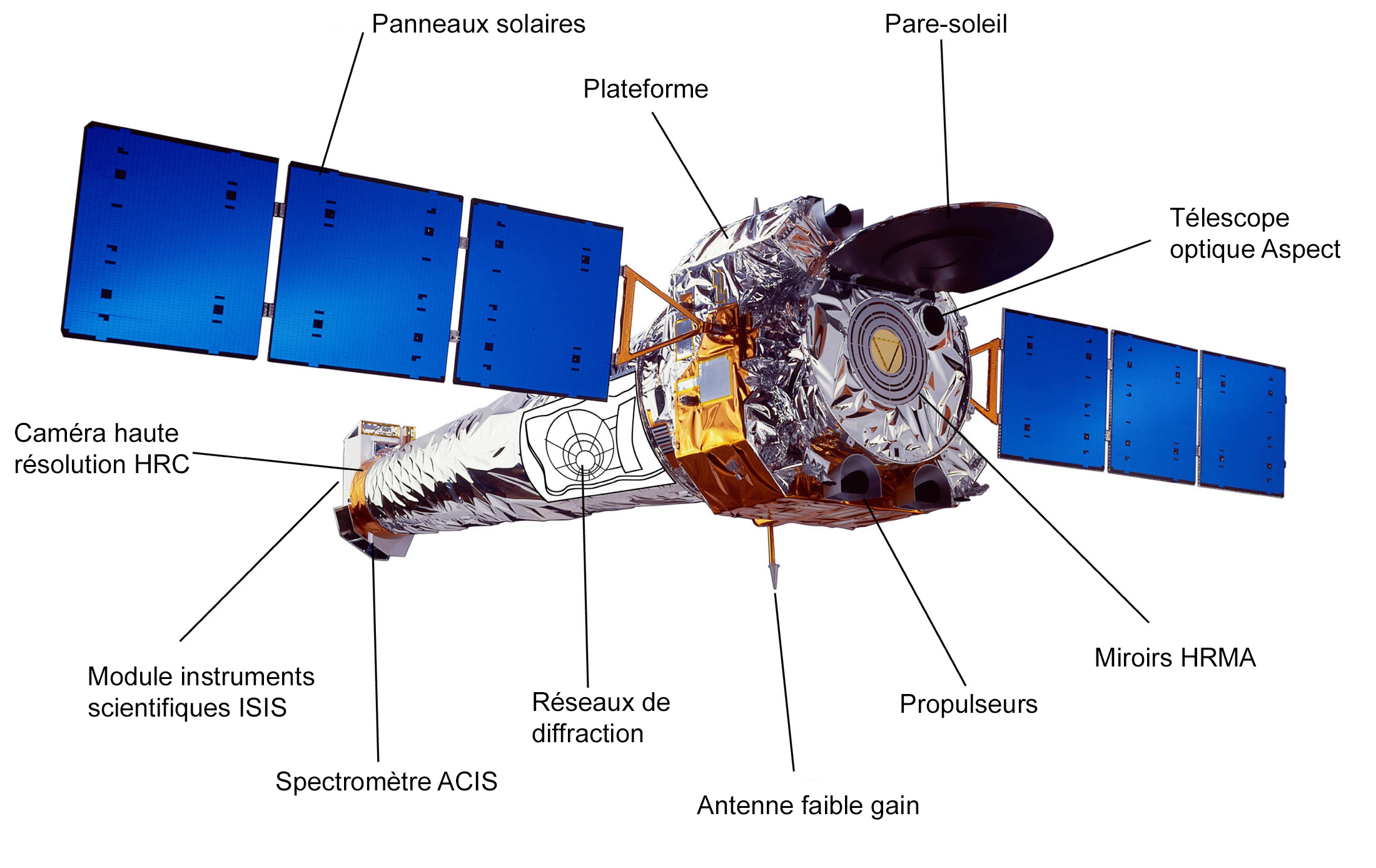 Schéma du télescope spatial X Chandra avec légende en français